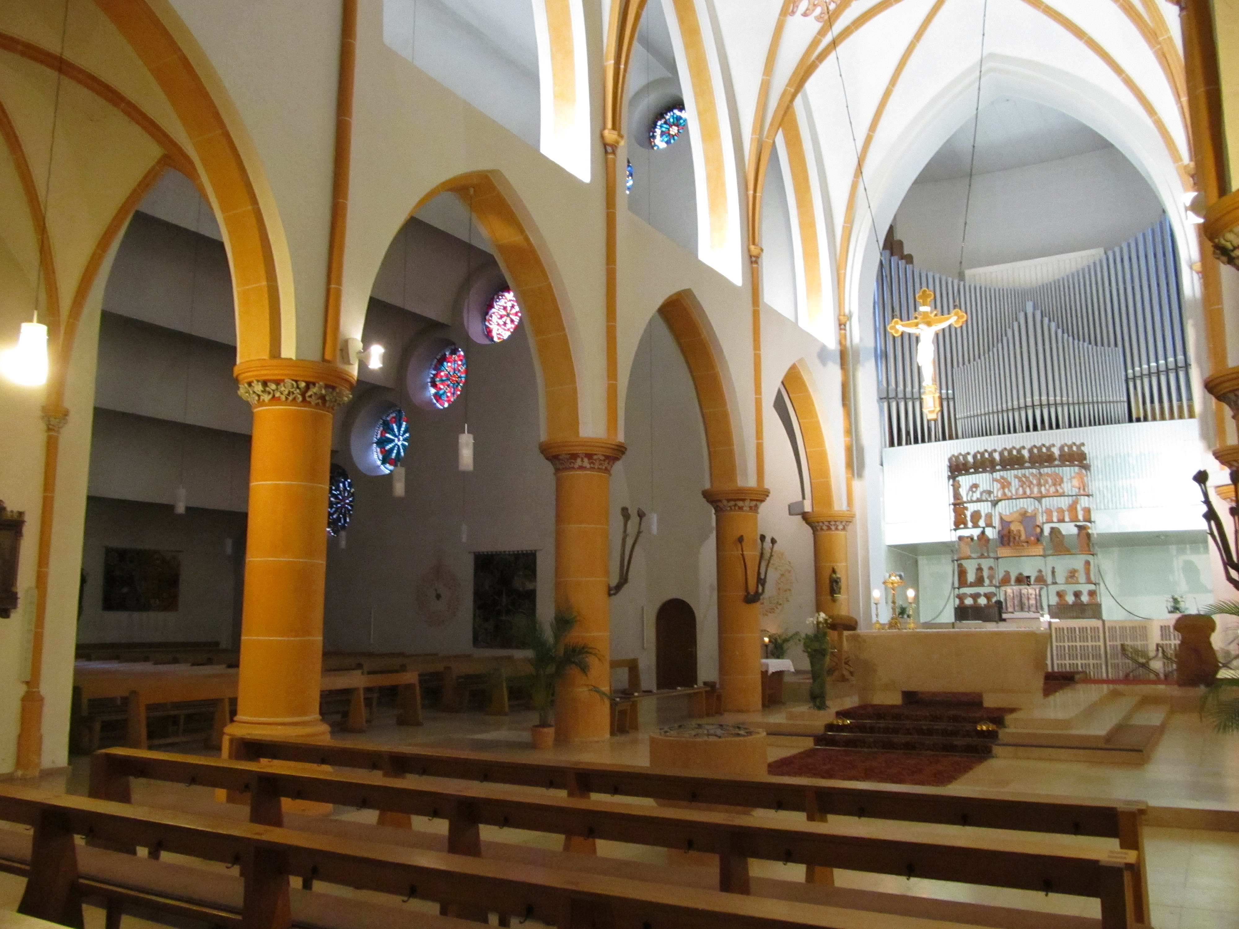 Blick ins Innere der katholischen Liebfrauenkirche in Püttlingen, Saarland